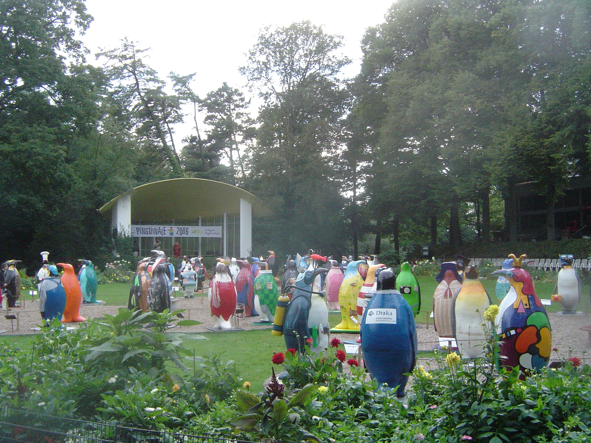 Pinguine im Wuppertaler Zoo während der Pinguinale 2006